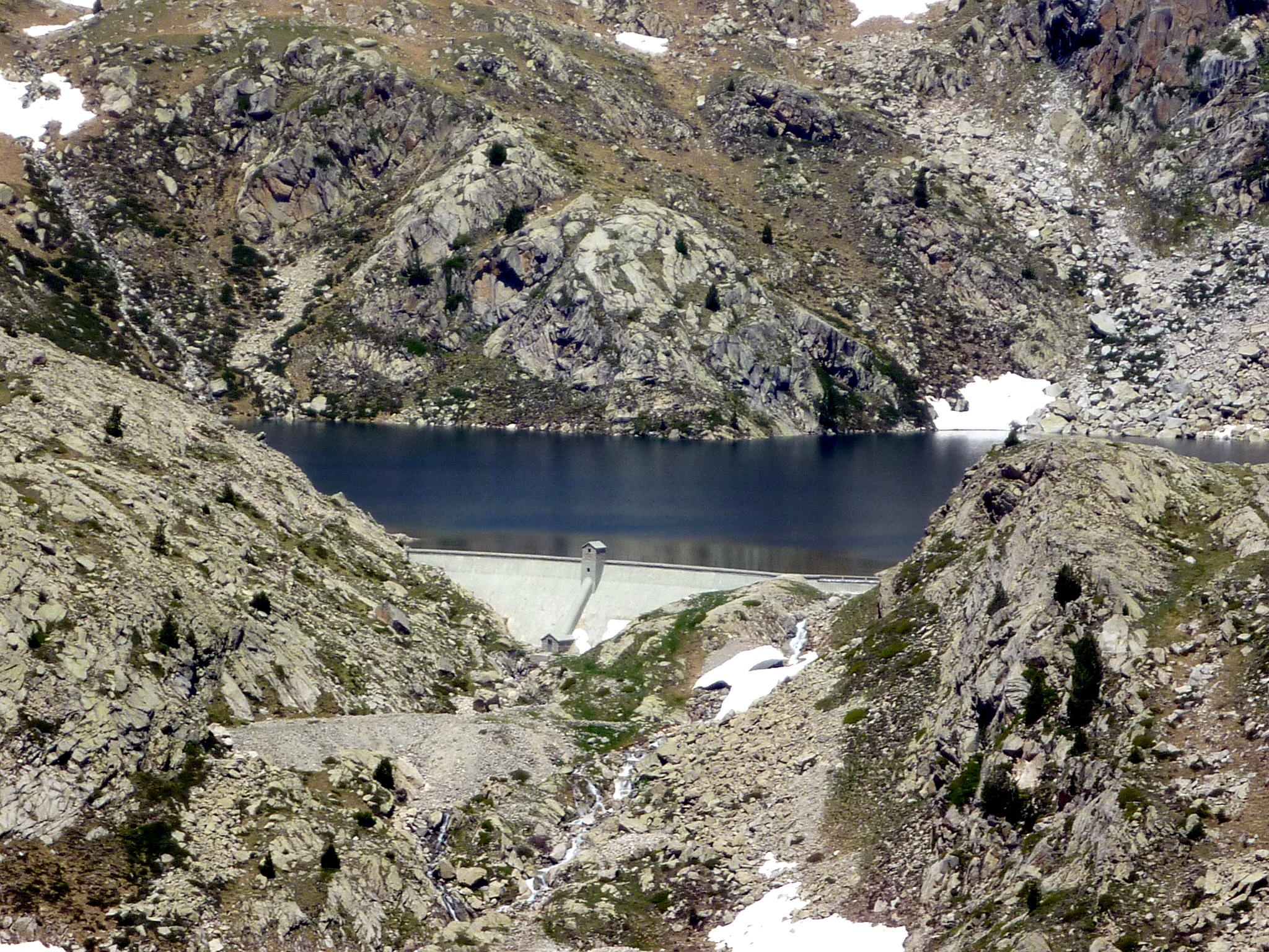 L'Estany Salado des de la collada de Font Sobirana, als Estanys de Cabdella (Pallars Jussà)